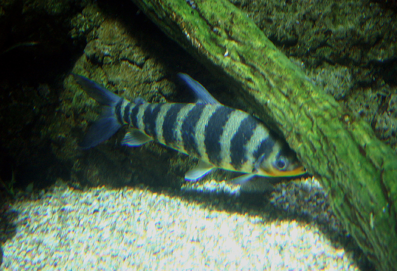 Autore:Marrabbio2